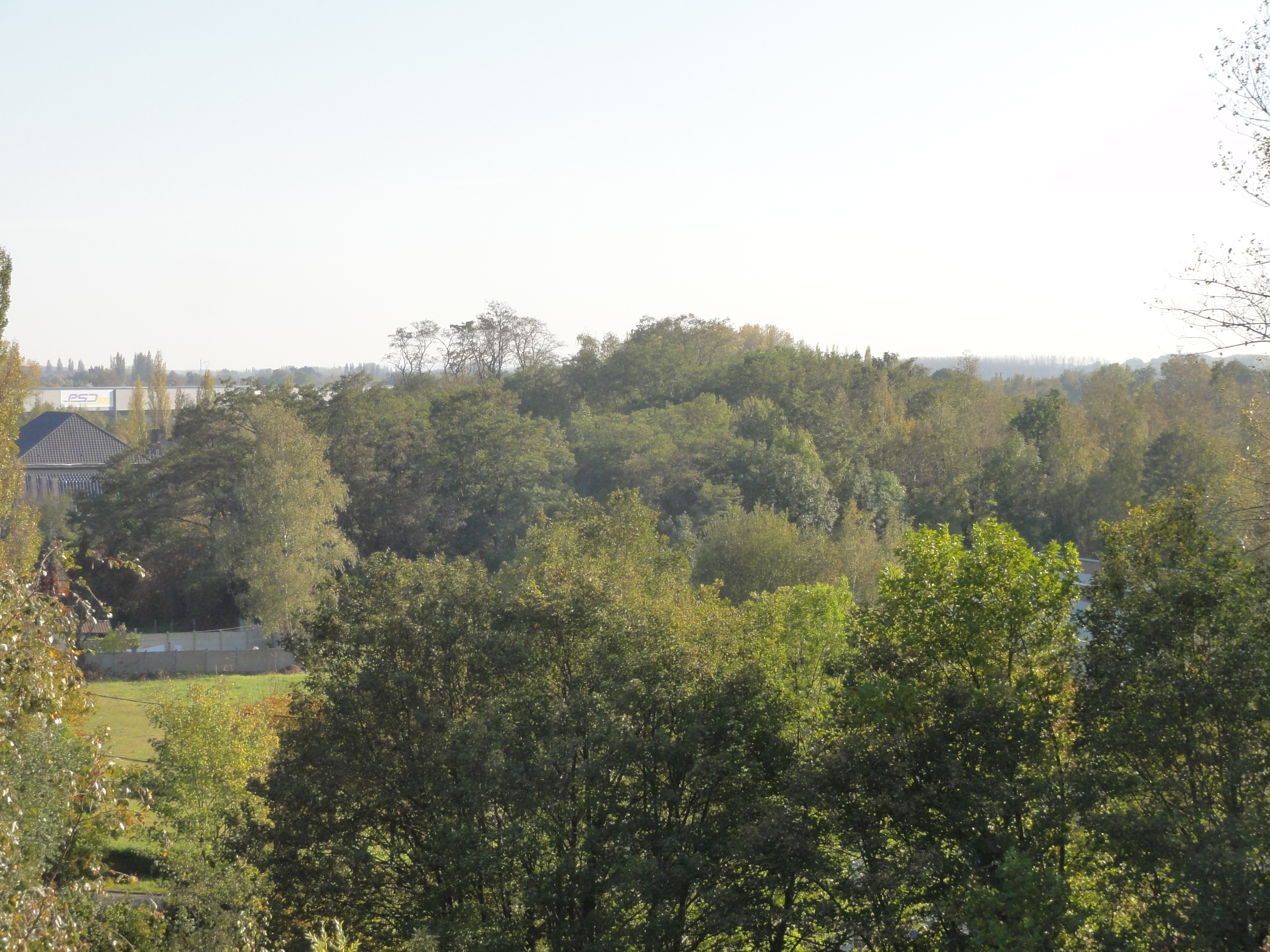 Terril n° 115A dit 2 d'Oignies, Fosse n° 2 de la Compagnie des mines d'Ostricourt, Libercourt, Pas-de-Calais, Nord-Pas-de-Calais, France.